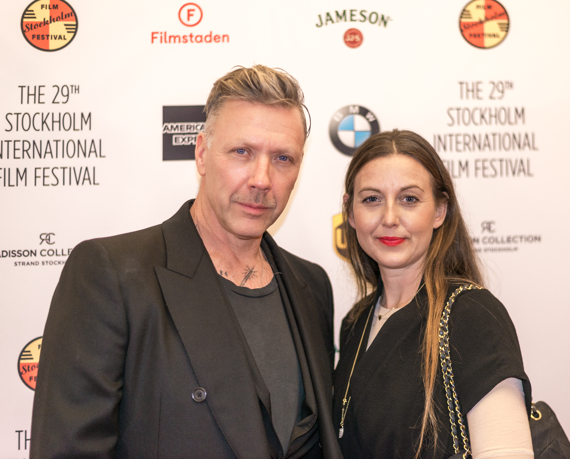 Mikael Persbrandt & Sanna Lundell på Stockholms internationella filmfestival 2018.